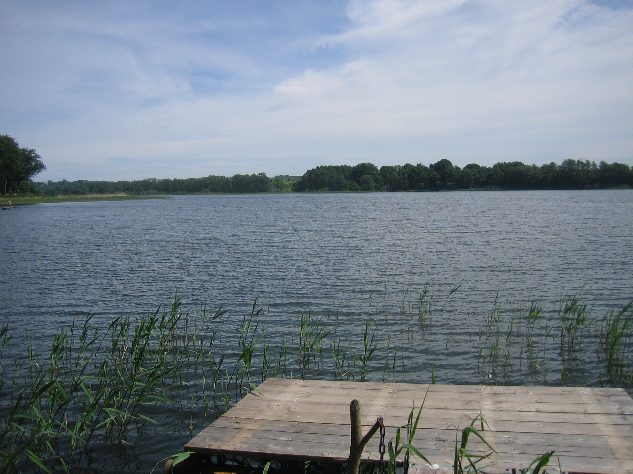 Camminer See, Landkreis Mecklenburgische Seenplatte